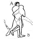 crochetage3.jpg